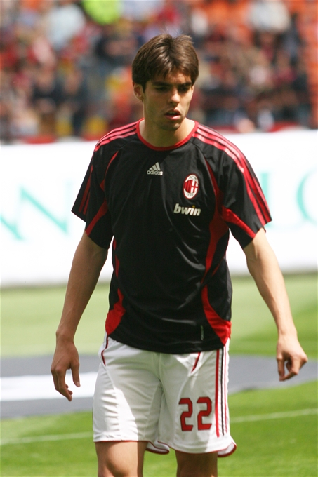 Kaká